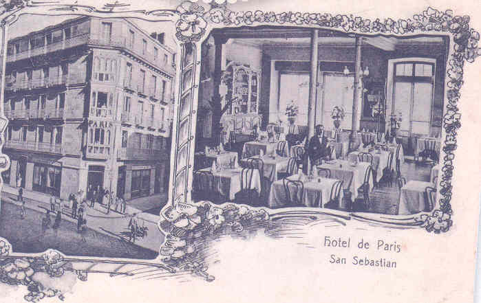 Hotela bista orokorra